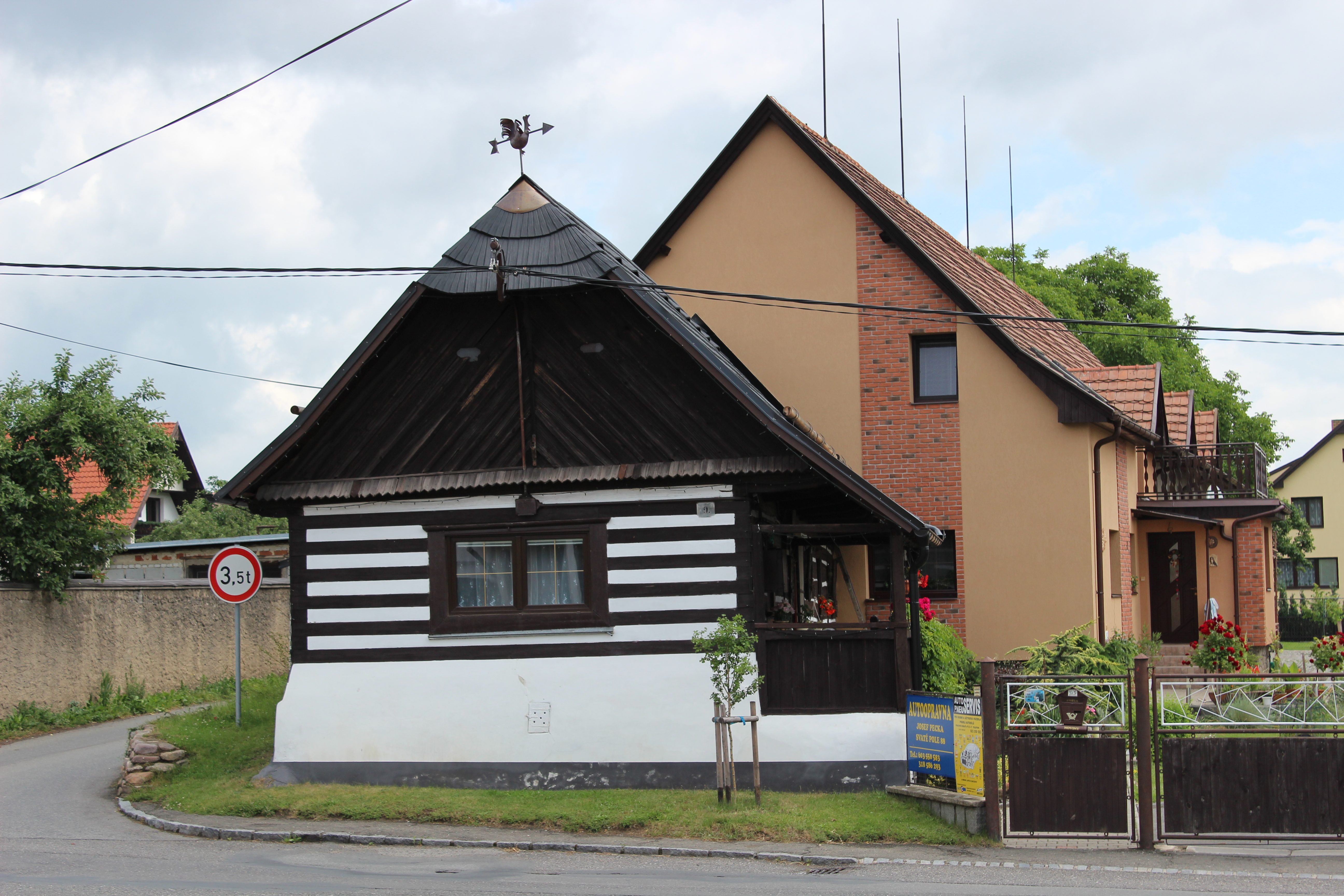 Roubenka ve vesnici. Svaté Pole. Okres Příbra. Česká republika.